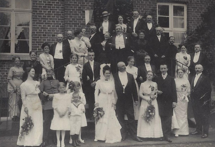 Hochzeit des Pächters Hans (Theodor Franz Julius) Voß aus Neuhof (Ortsteil von Dobbertin) mit Theodore (Daus) Schulze vor dem Haus des Küchenmeisters Gustav (Ludwig Theodor) Schulze im Kloster Dobbertin. Theodore war vorher Sekretärin beim Küchenmeister. Sohn Wilhelm (Otto Jacob Ulrich Martin) Schulze wurde mit 21 Jahren als Leutnant des Mecklenburgischen Füsilier-Regiments Nr. 90 im 1. Weltkrieg auf der Flucht aus der französischen Gefangenschaft am 7. November 1915 in Marokko erschossen.